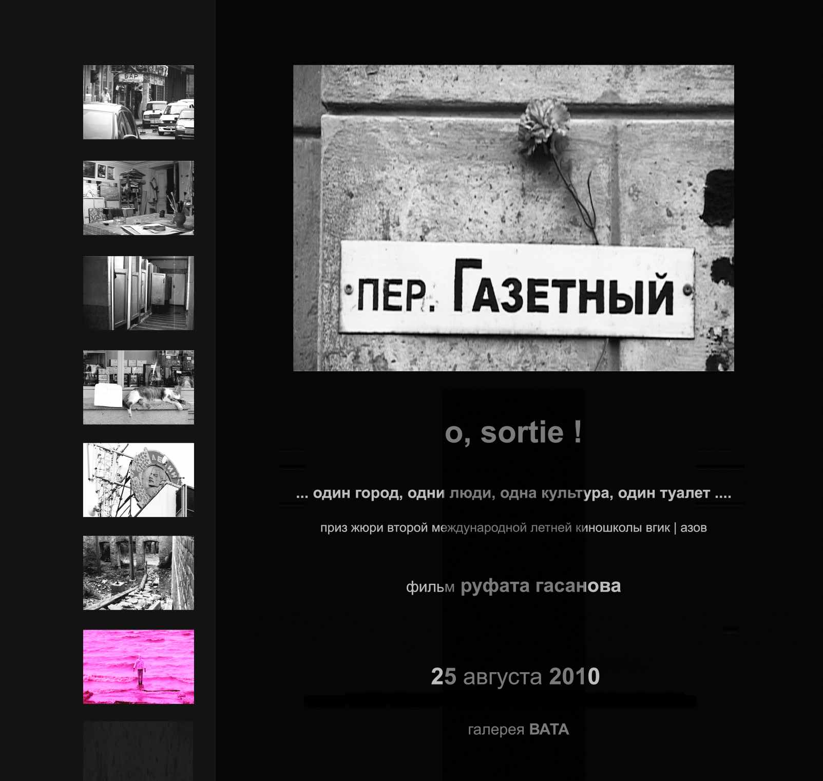 Постер презентации док. фильма "O, Sortie!" (реж. Руфат Гасанов, 2010) в галерее "Вата"